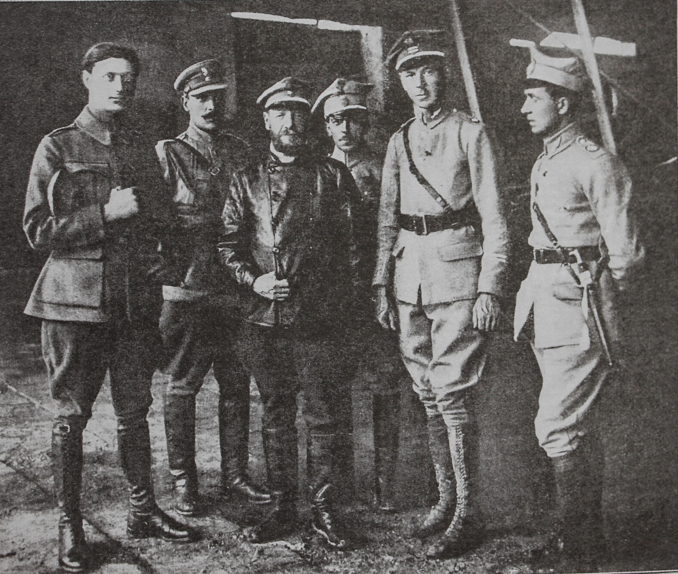 Generał Lucjan Żeligowski w Stanisławowie po przewiezieniu go samolotem ze Lwowa przez por. Ludomiła Rayskiego; czerwiec 1919